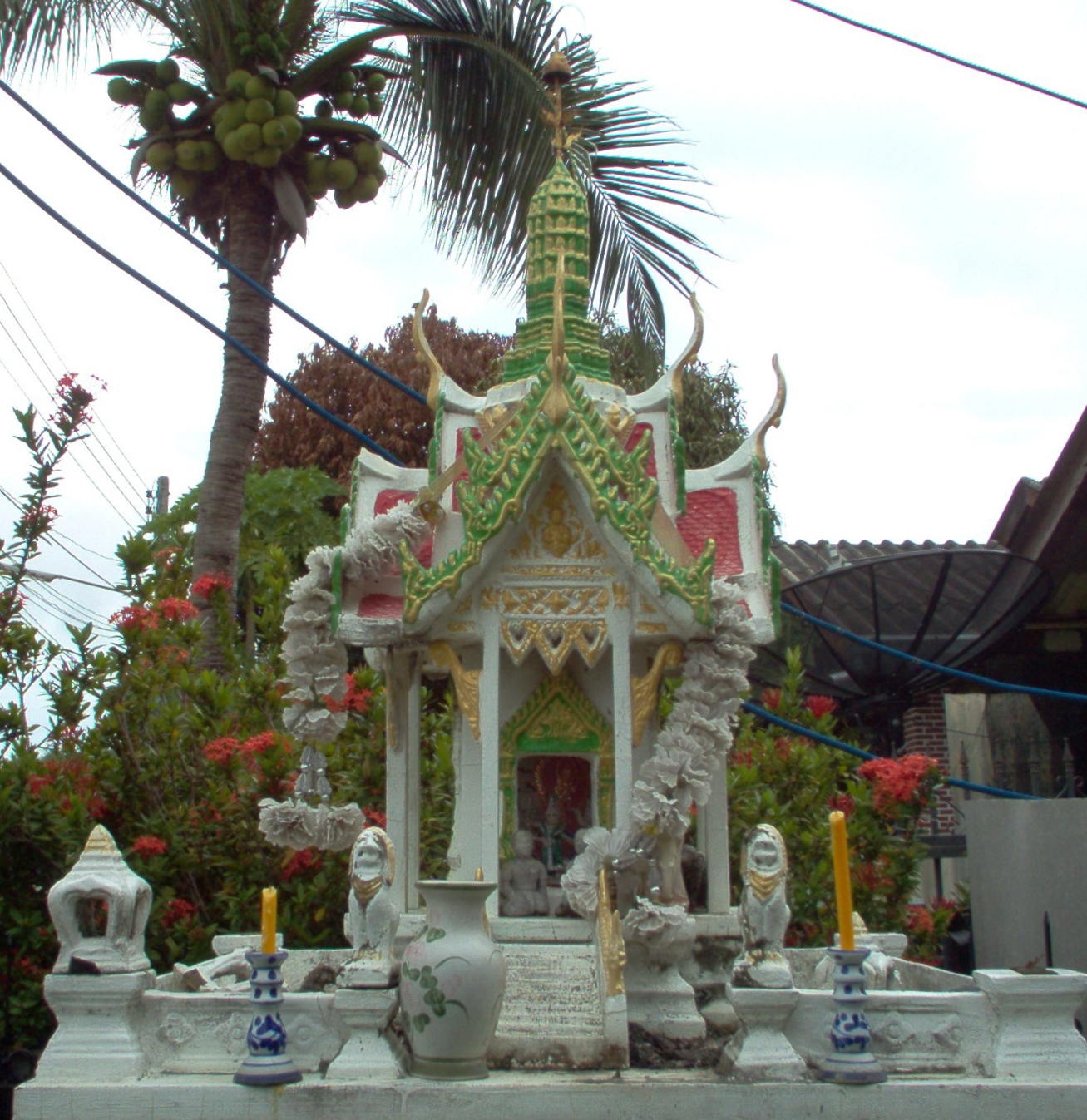 Budistlik altar.